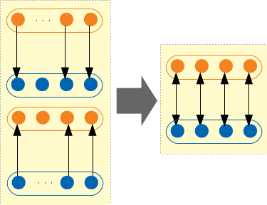 Image qui explique le théorème de Cantor-Bernstein